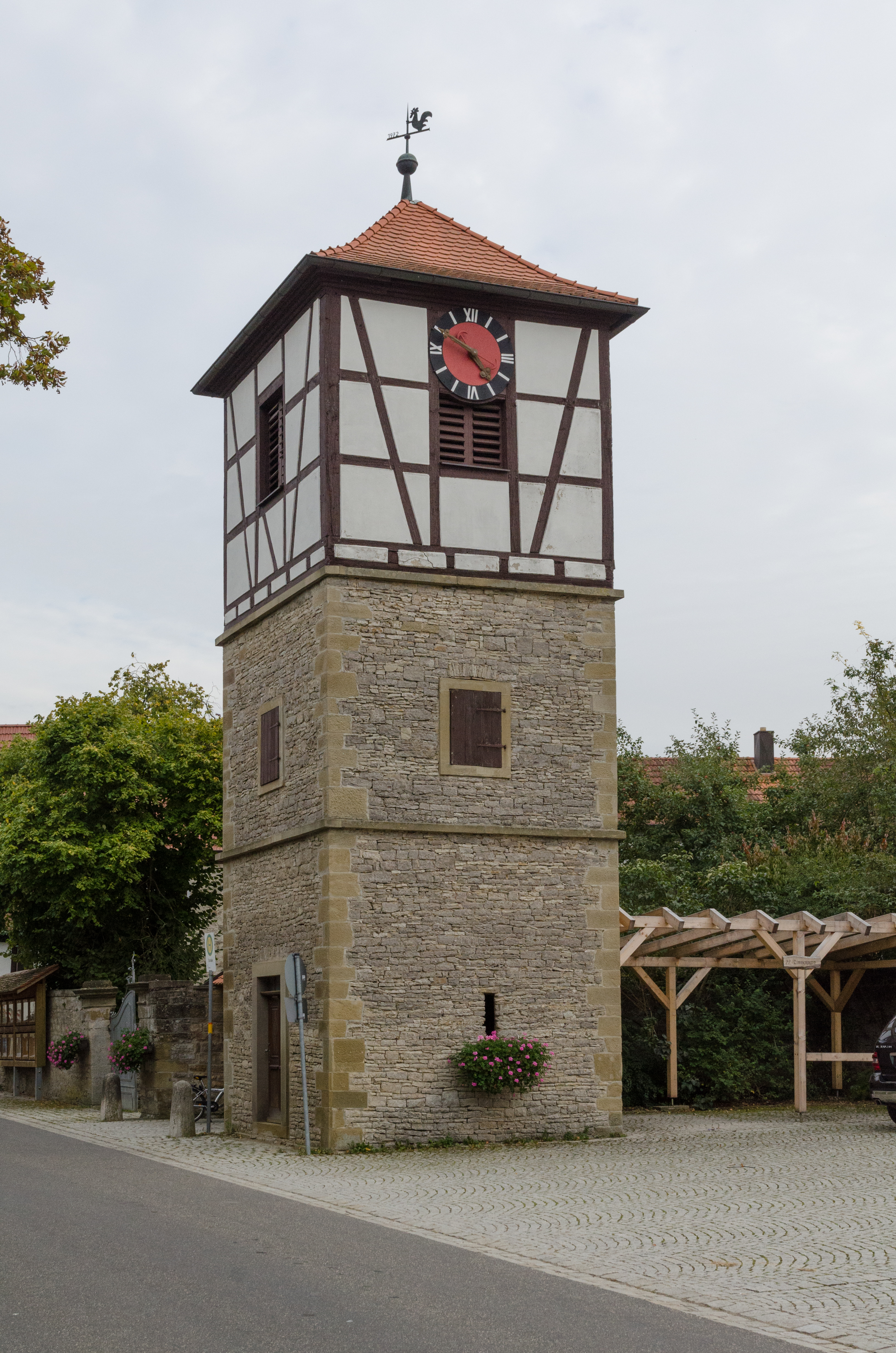 Arnstein, Büchold, Förstergasse 1, sog. "Läutturm"; erbaut 1826 aus den Steinen der ehem. Pfarrkirche St. Johannes d. Täufer (abgerissen 1795) zum Läuten bei einem Brand.